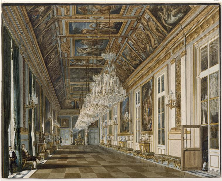 La galerie des ambassadeurs au palais des Tuileries (circa 1860)